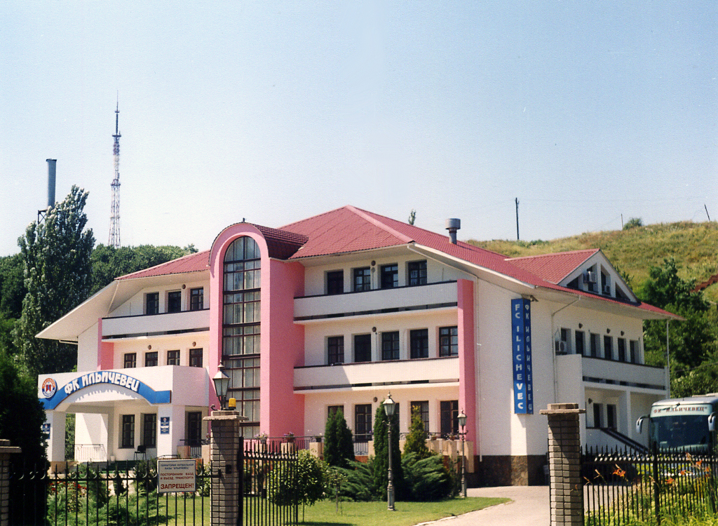 База ФК Іллічівець (Маріуполь)